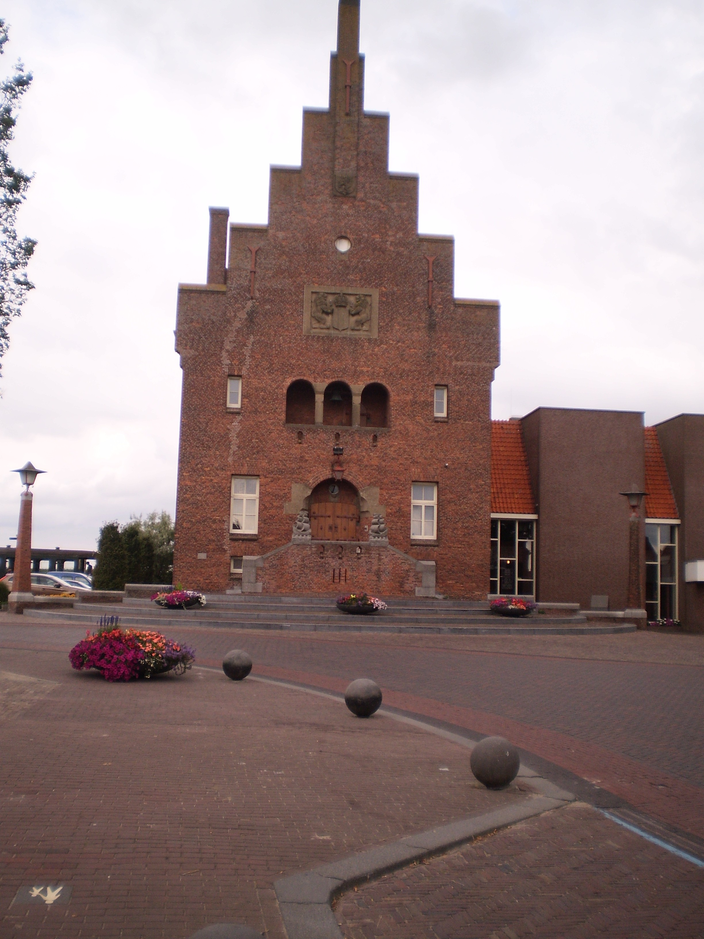 Stedhûs Medemblik.